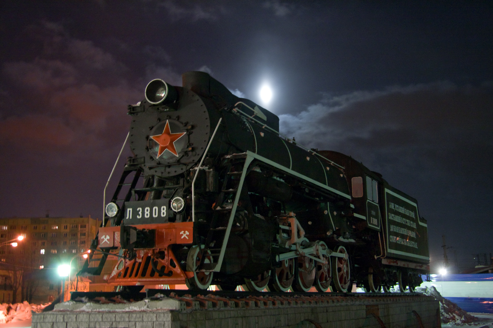 Паровоз на станции Междуреченск